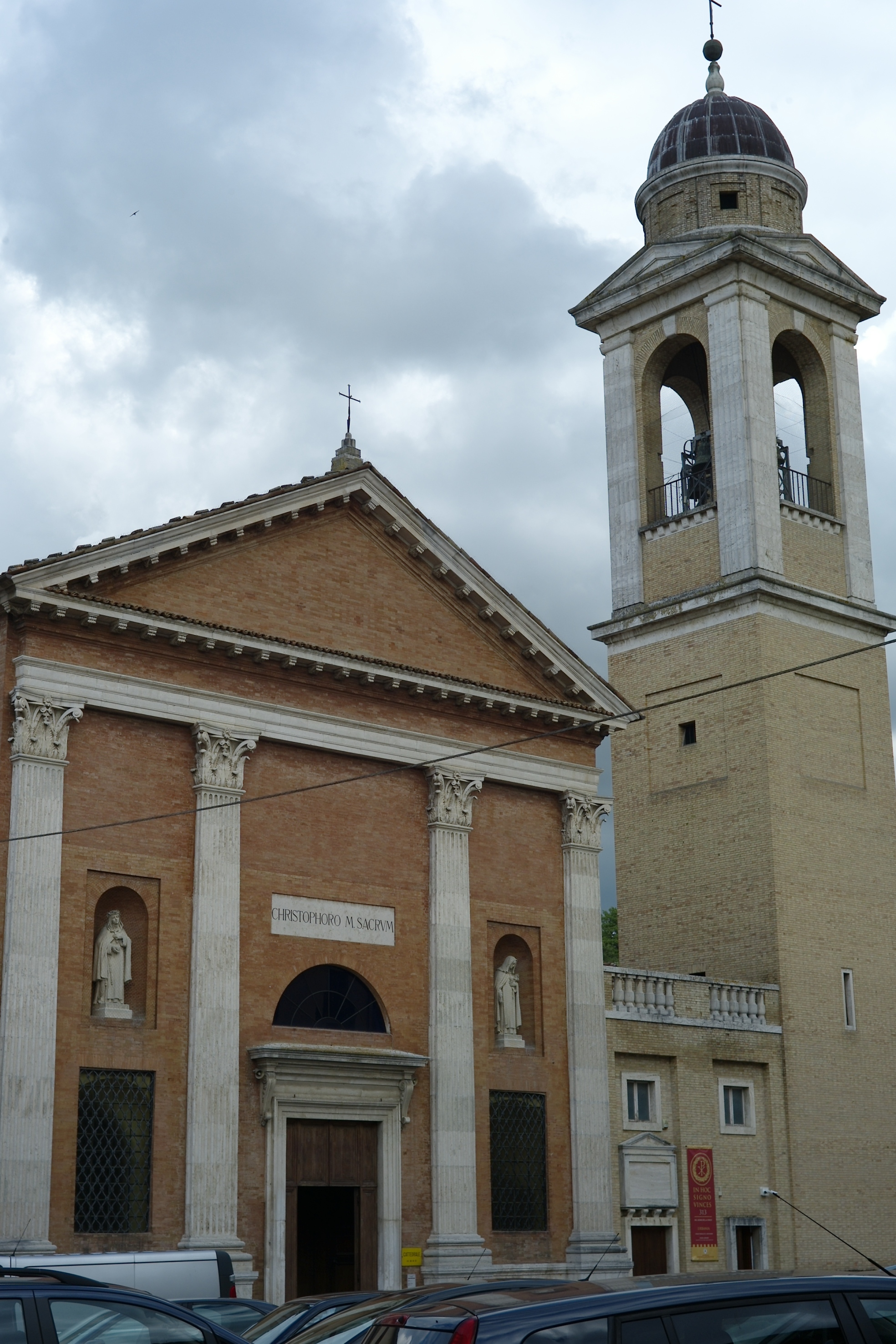 Facciata esterna e campanile del Duomo di Urbania.